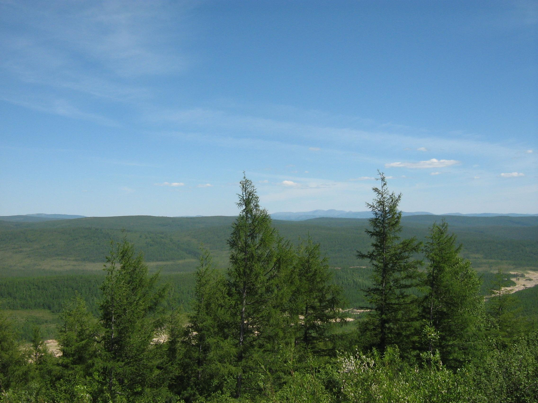 Larix gmelinii, Neryungrinskiy Rayon, Sakha, Russia